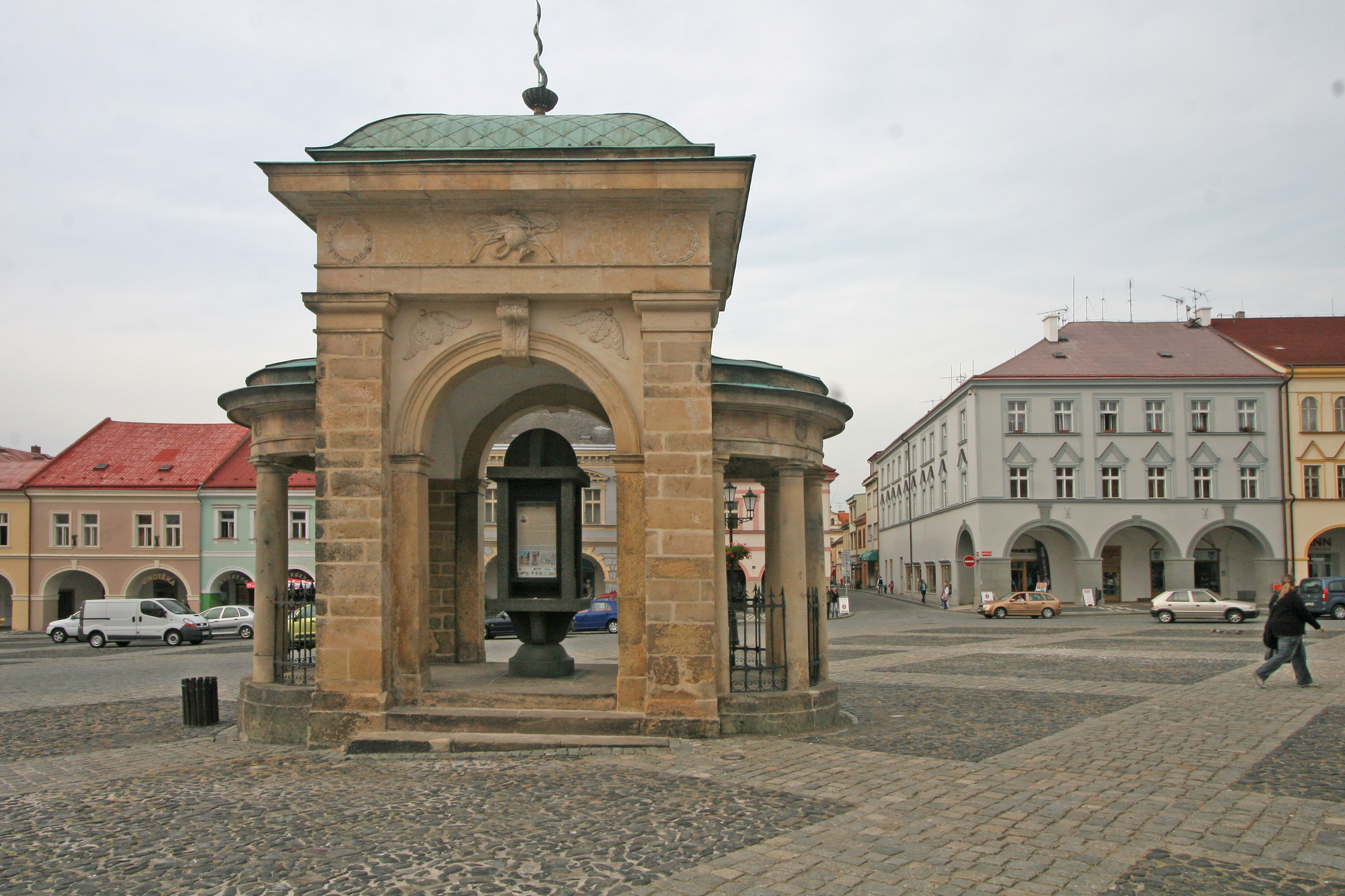 kašna korunovační - studna, Valdštejnovo nám., Jičín